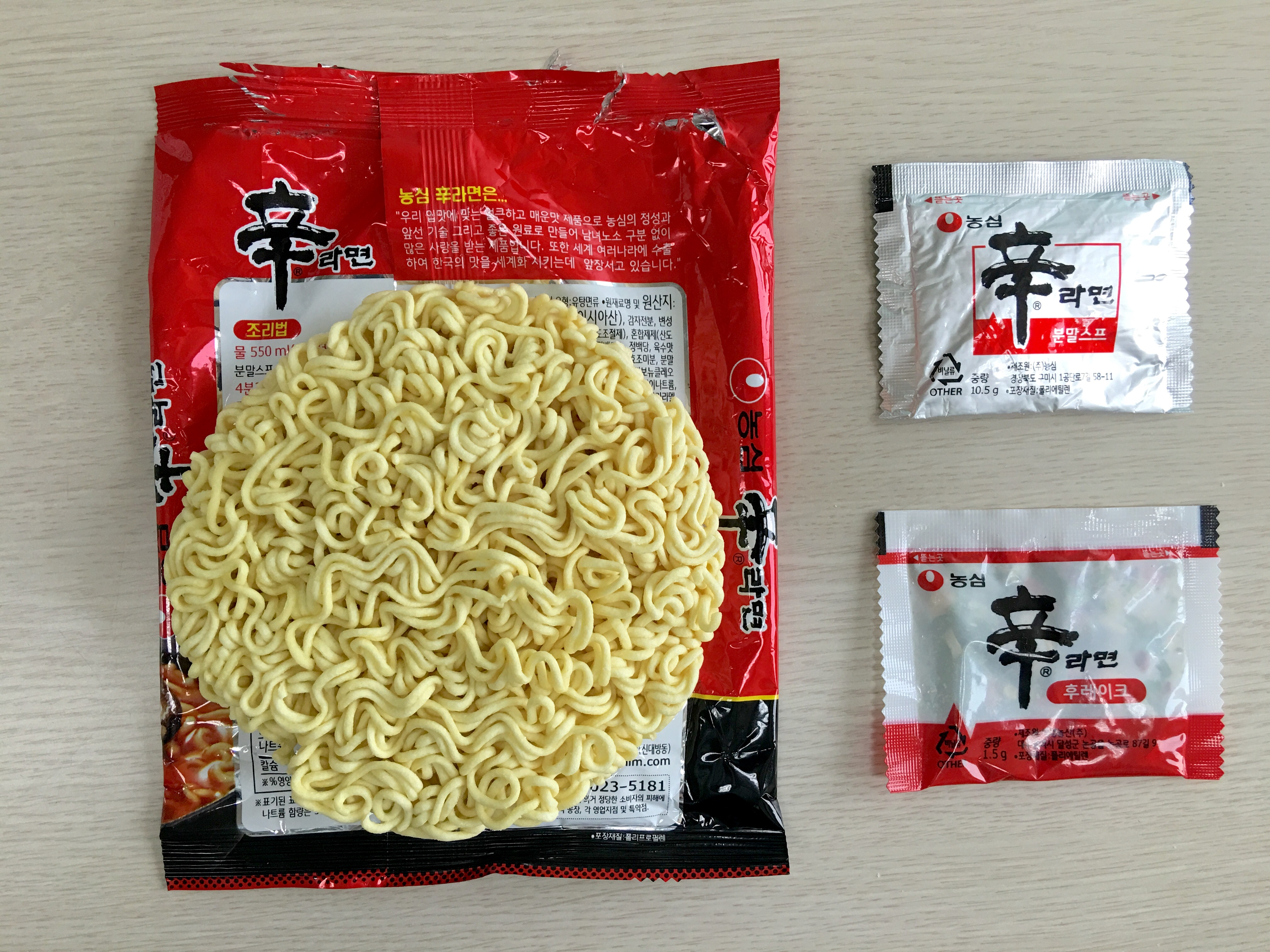 신라면(한국)의 면과 스프 구성